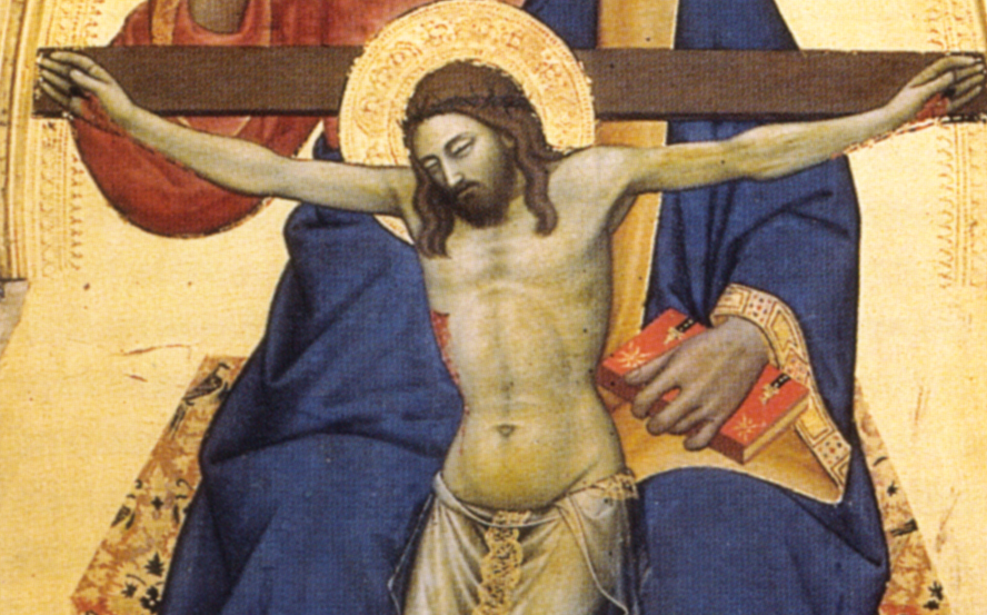 detail